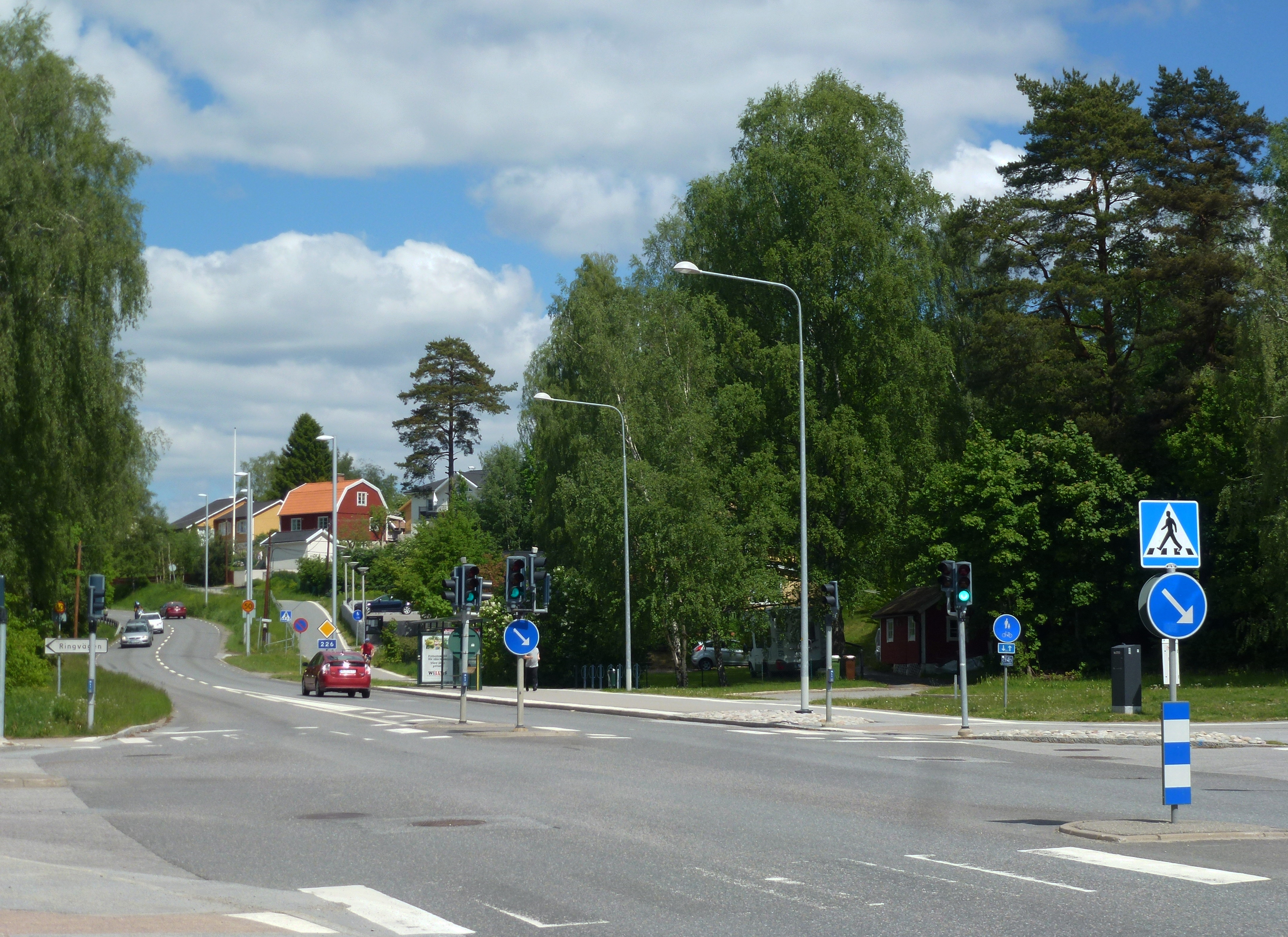 Tätorten Vårsta i Botkyrka kommun, Dalvägen